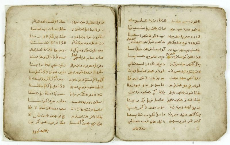 Acèh: Hikayat Akeubaro Karim